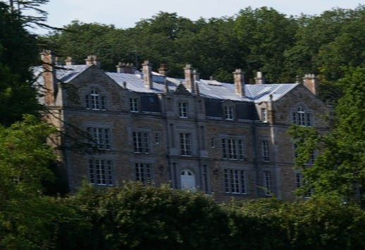 Château de Trankalou, Deux-Evailles (Mayenne)